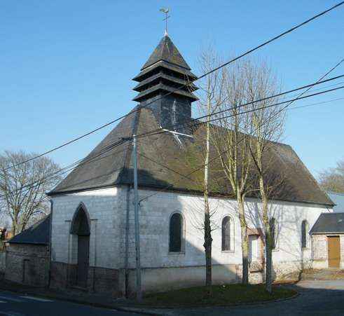 L'église Saint-Martin de Bernay-en-Ponthieu.